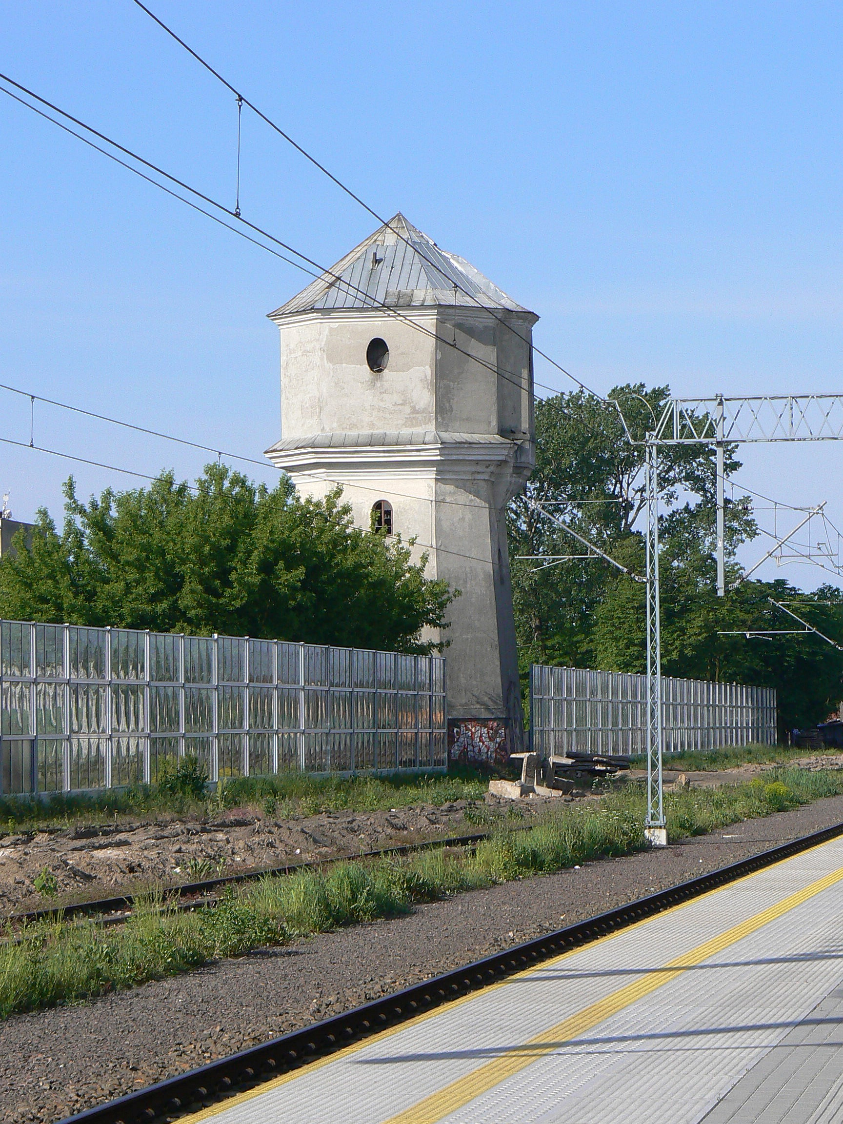 Tłuszcz, wieza cisnien z 1912 r